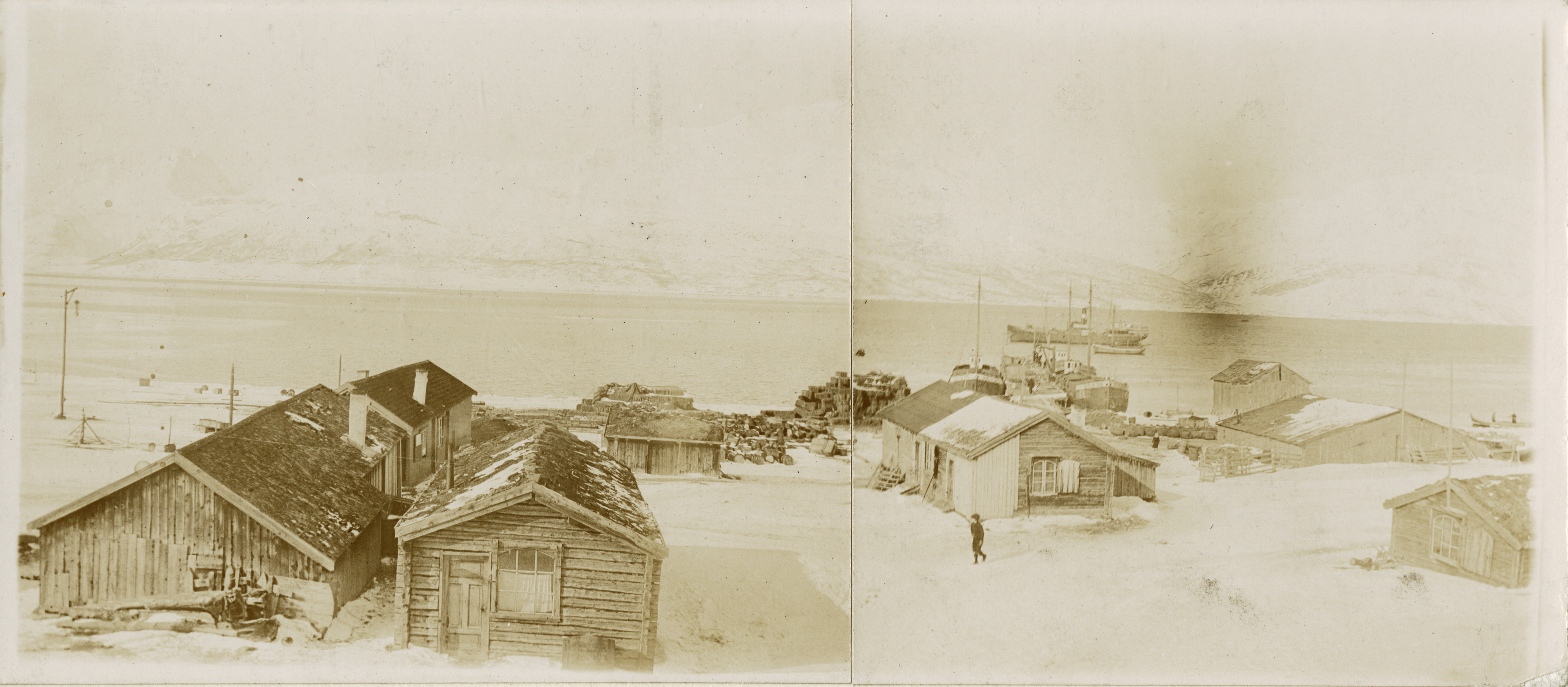 Skibotn i Storfjord, Troms